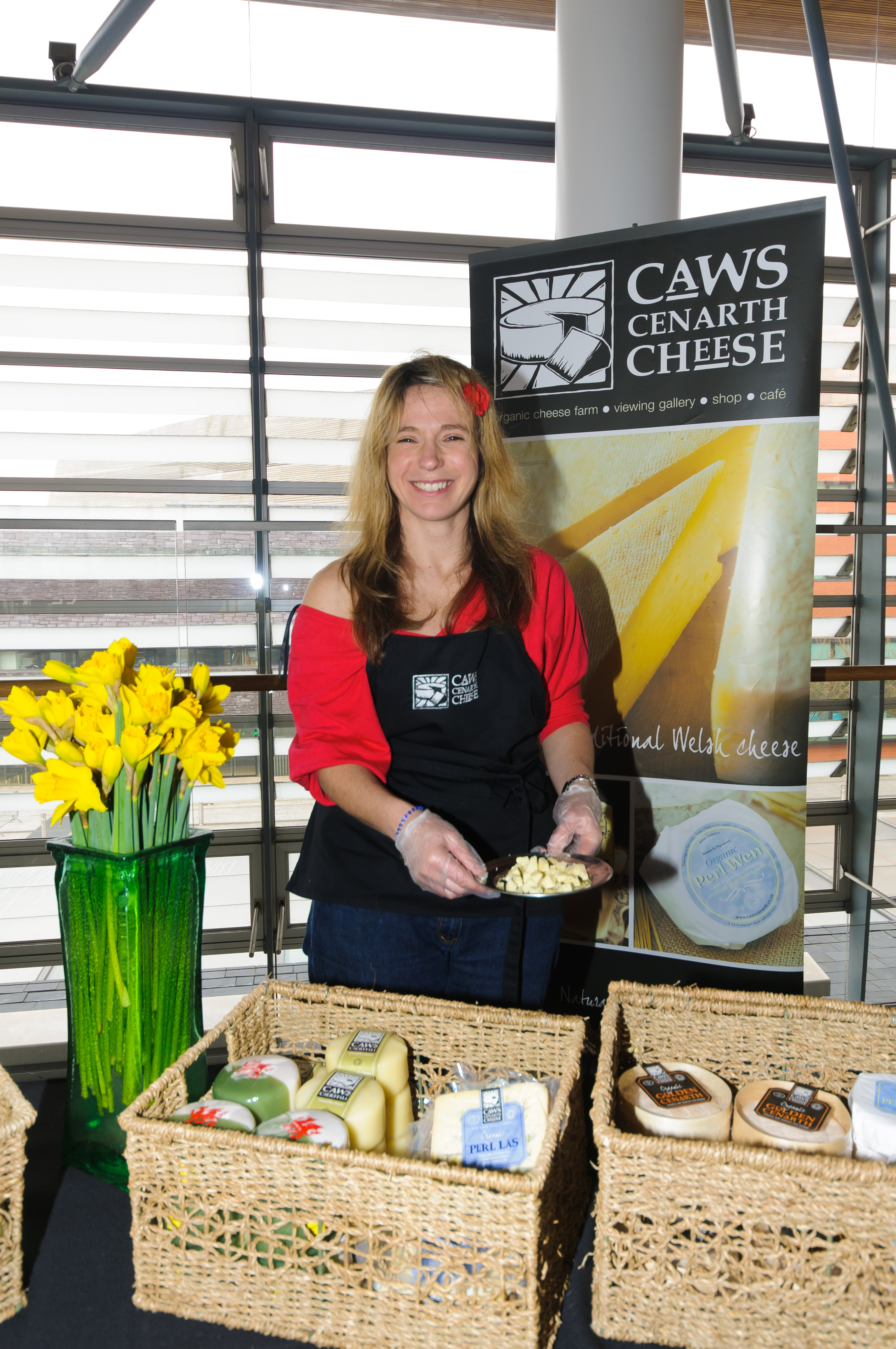 St David's Day Celebration at The Senedd, 1 March 2012 / Dathliadau Dydd Gwyl Dewi yn y Senedd, 1 Mawrth 2012